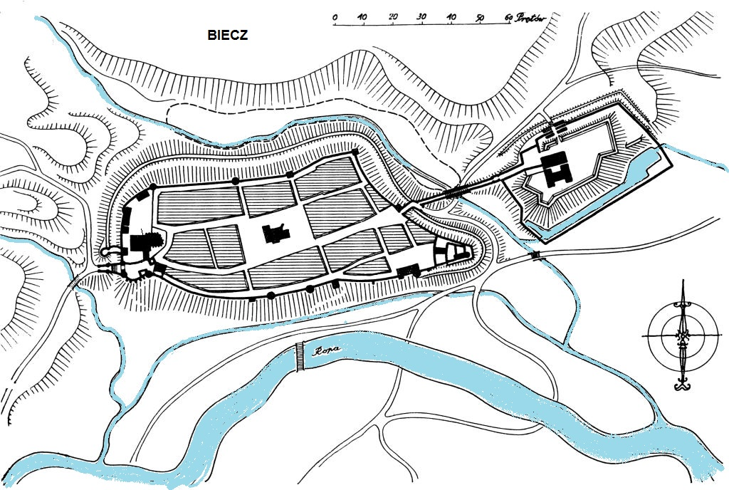 Plan miasta Biecz z zamkiem w średniowieczu.